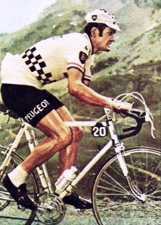 Bernard Thévenet en 1970 (à son premier Tour de France disputé).